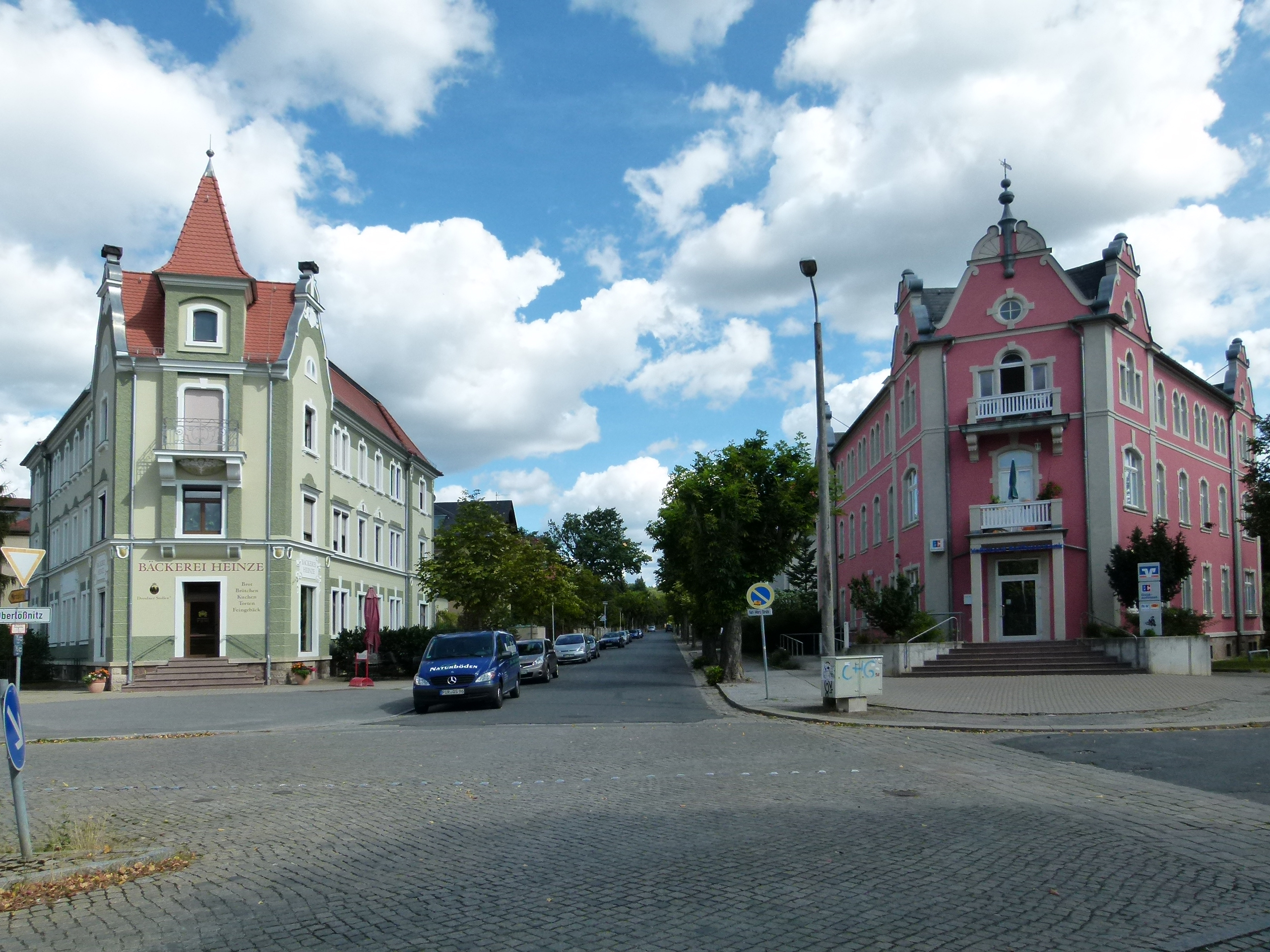 Denkmalgeschützte Häuser, Karl-Marx-Straße 1 und 2, Radebeul, Sachsen